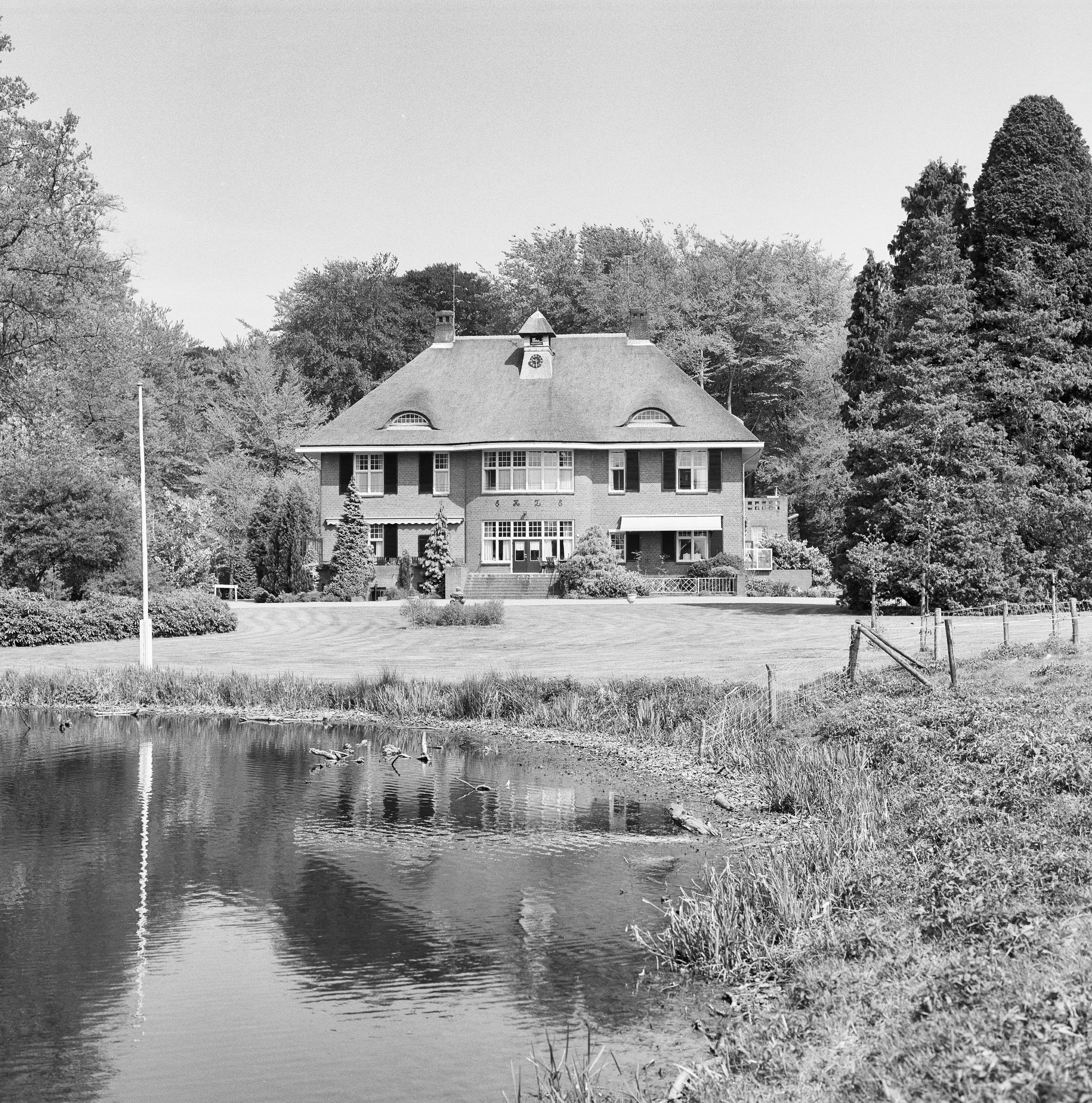 Exterieur OVERZICHT